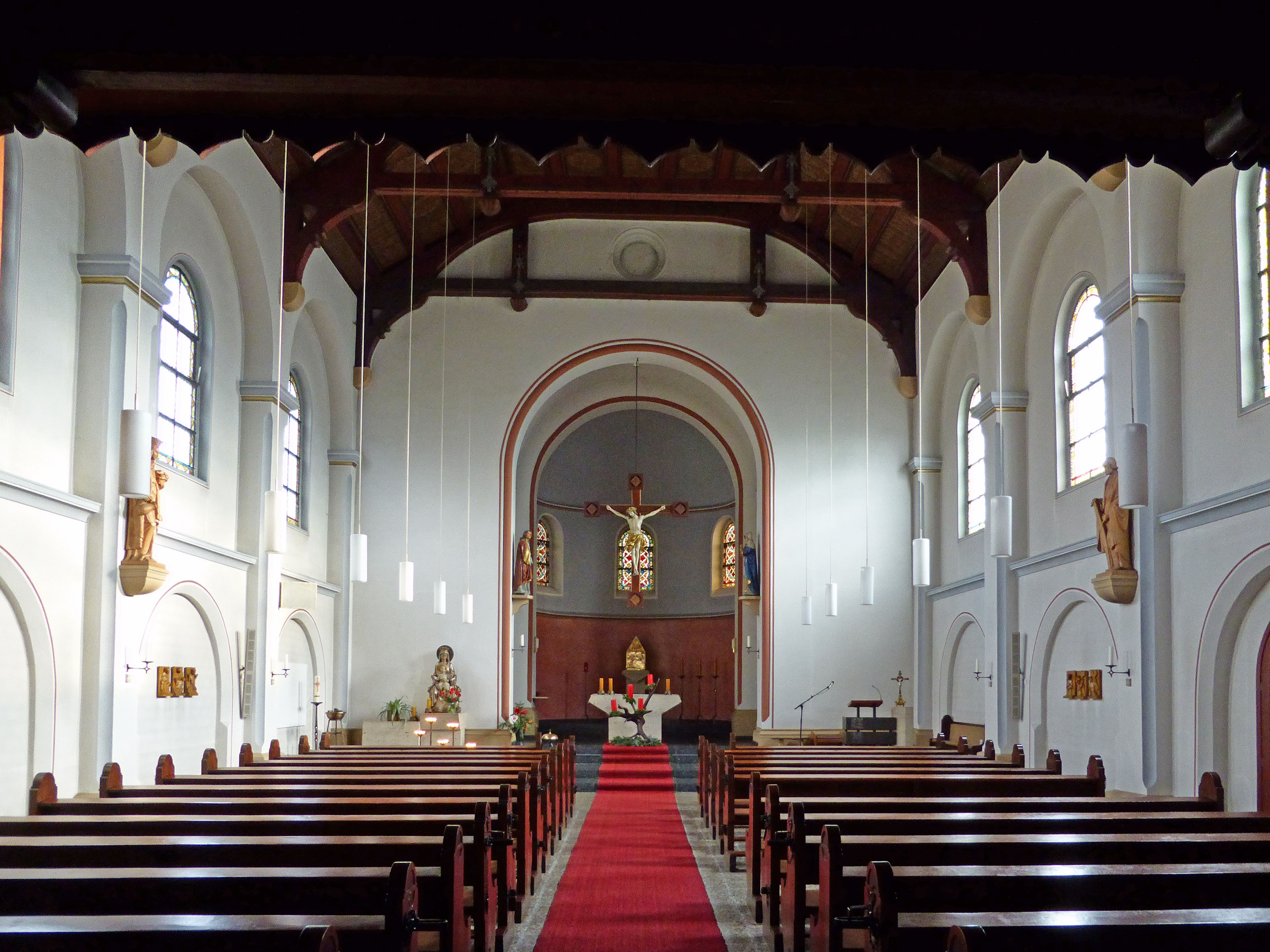 Katholische St.-Marien-Kirche in Schladen.